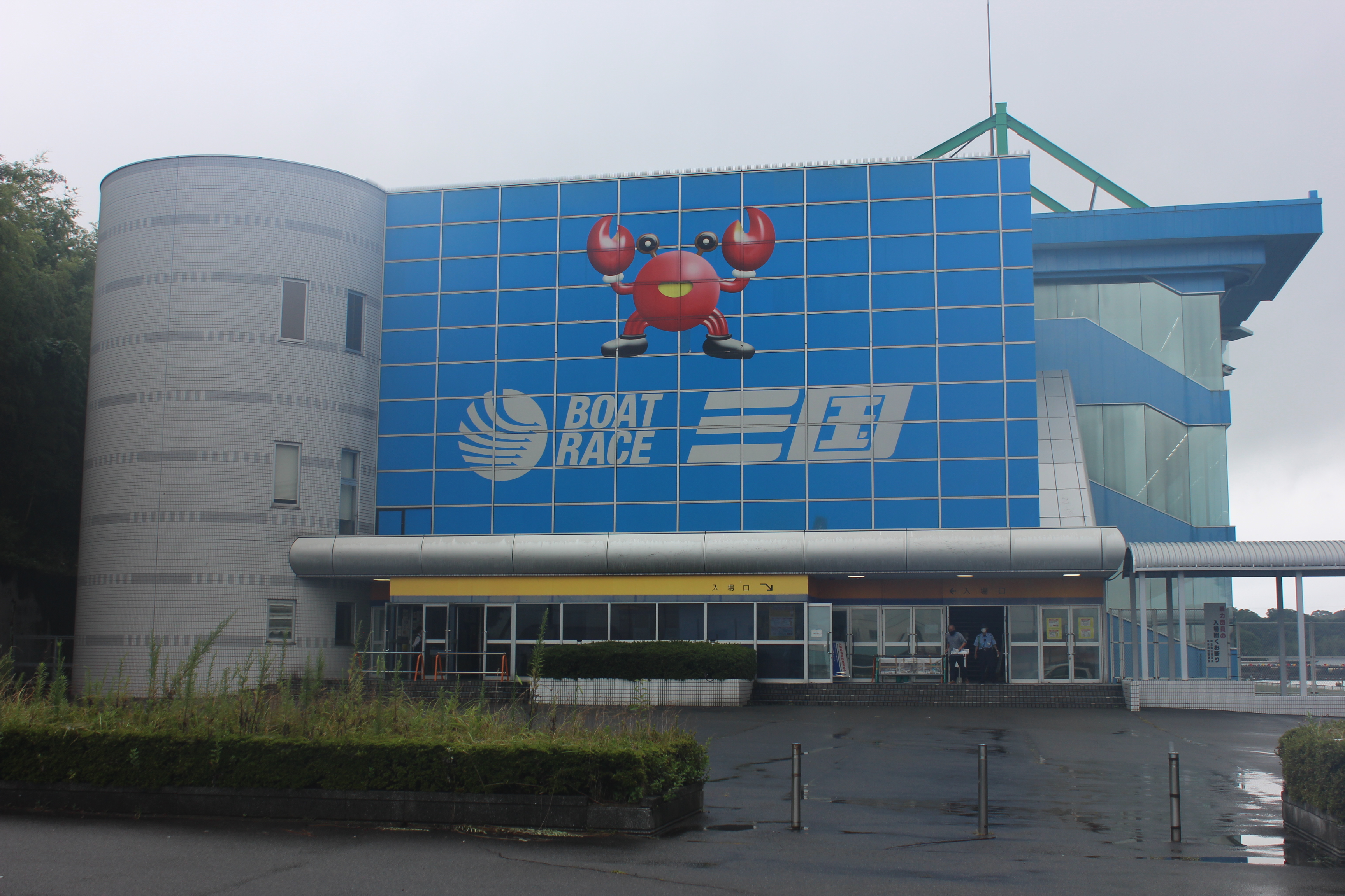 ボートレース三国